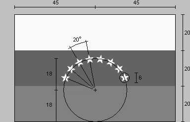 Especificaciones para la construcción de la bandera nacional de Venezuela.